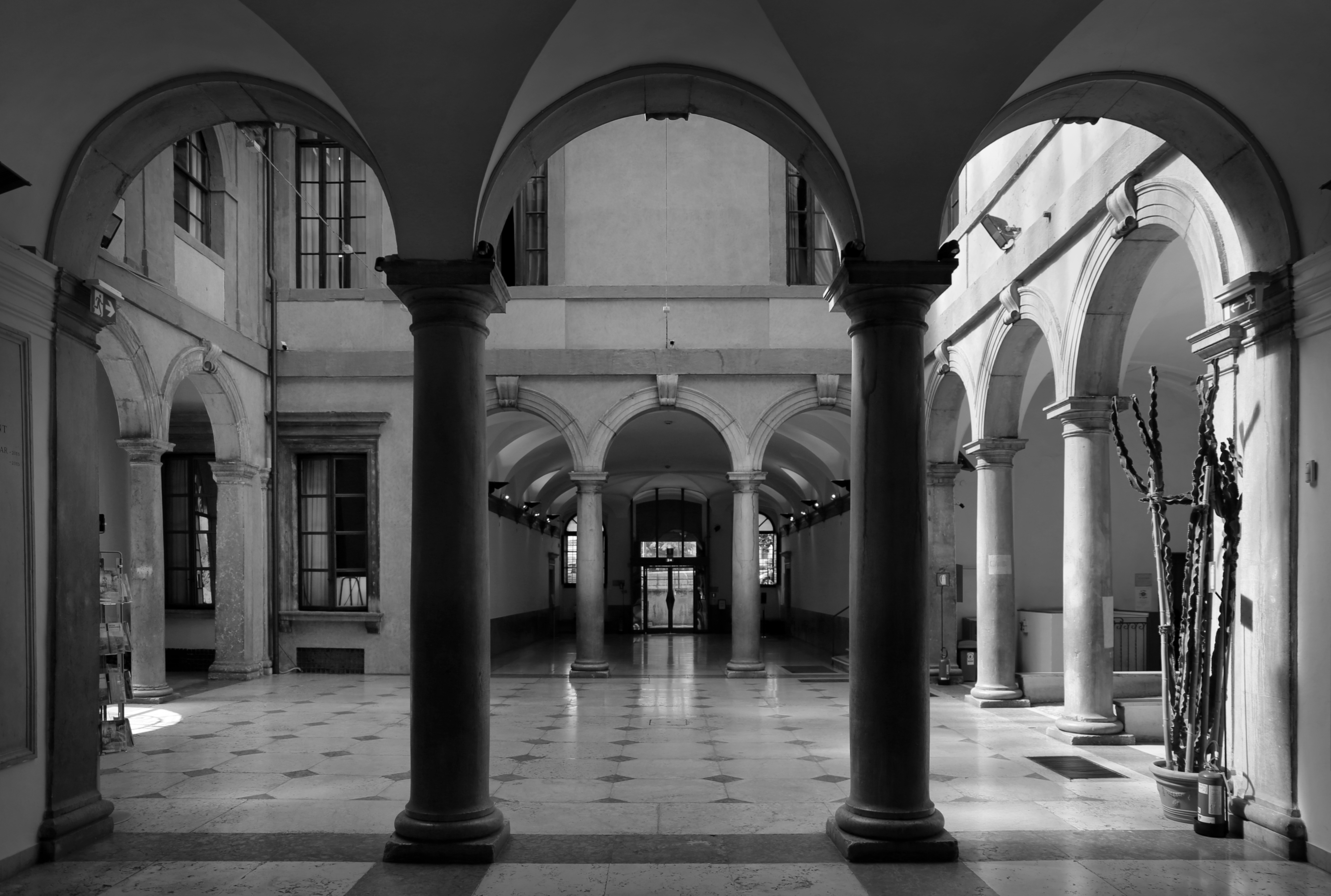 Palazzo Pompei This is a photo of a monument which is part of cultural heritage of Italy.